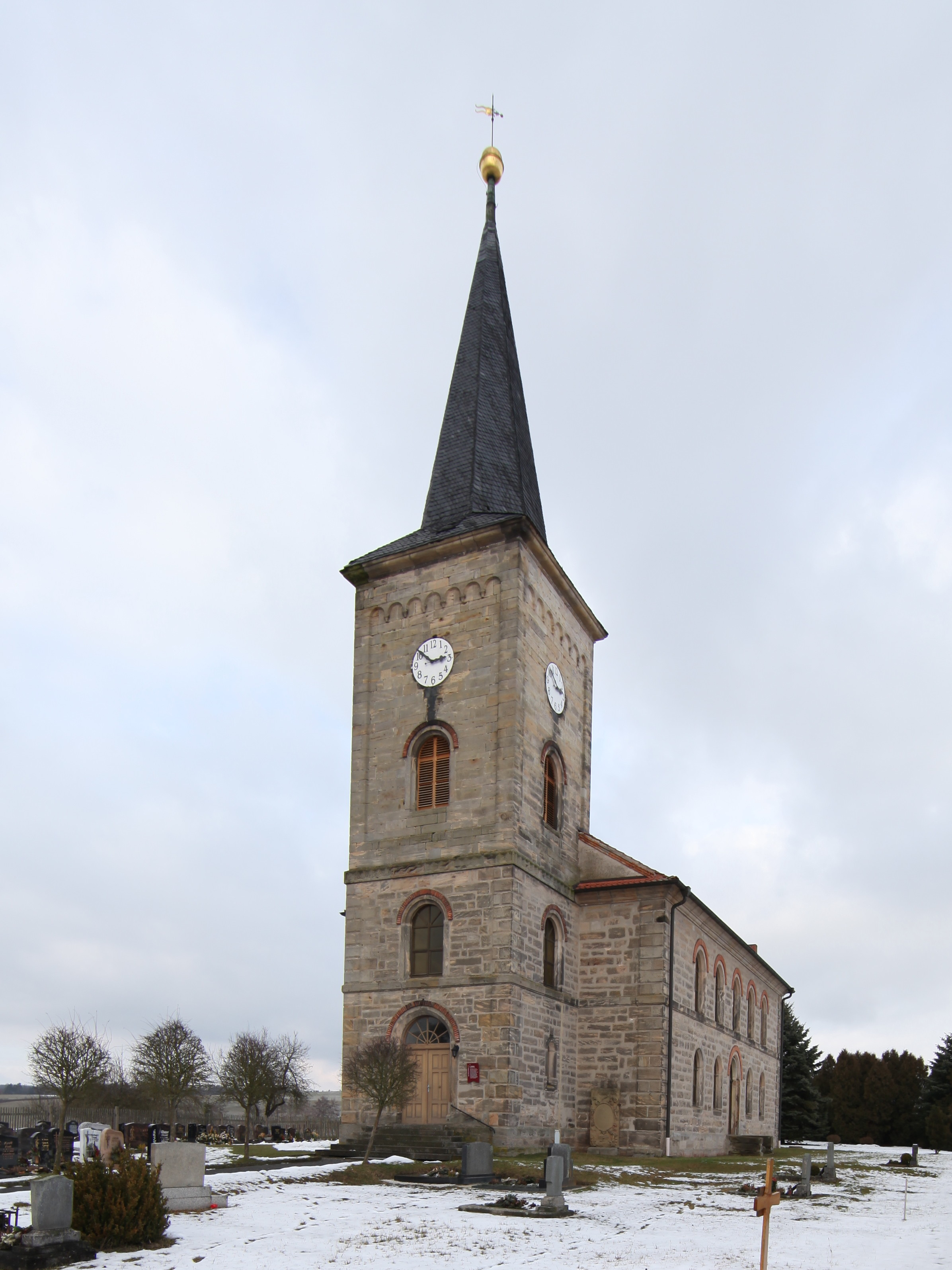 Ev. Kirche St. Matthäus in Lindenau, OT von Bad Colberg-Heldburg, Landkreis Hildburghausen